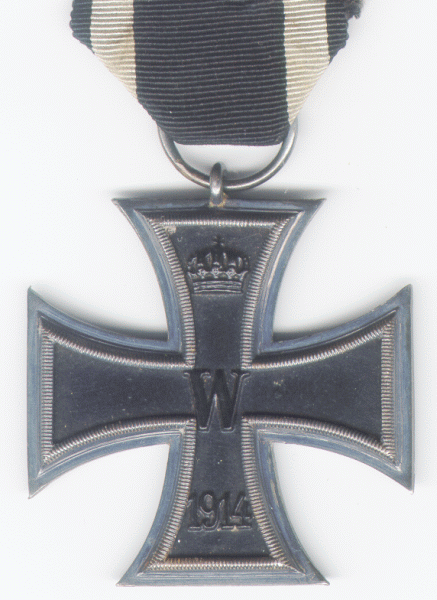 Eisernes Kreuz 2.Klasse Vorderseite